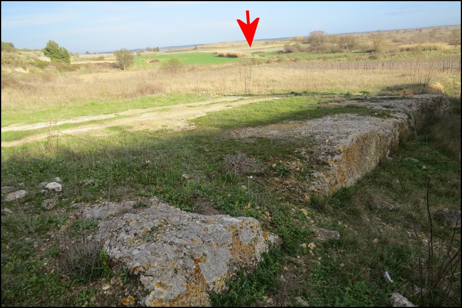 Petite carrière de la villa romaine de Vivios (Lespignan, Occitanie). Front de taille et fossé le séparant de la villa. Au fond du paysage (flèche) : emplacement des "Escaliers" et étang de Vendres